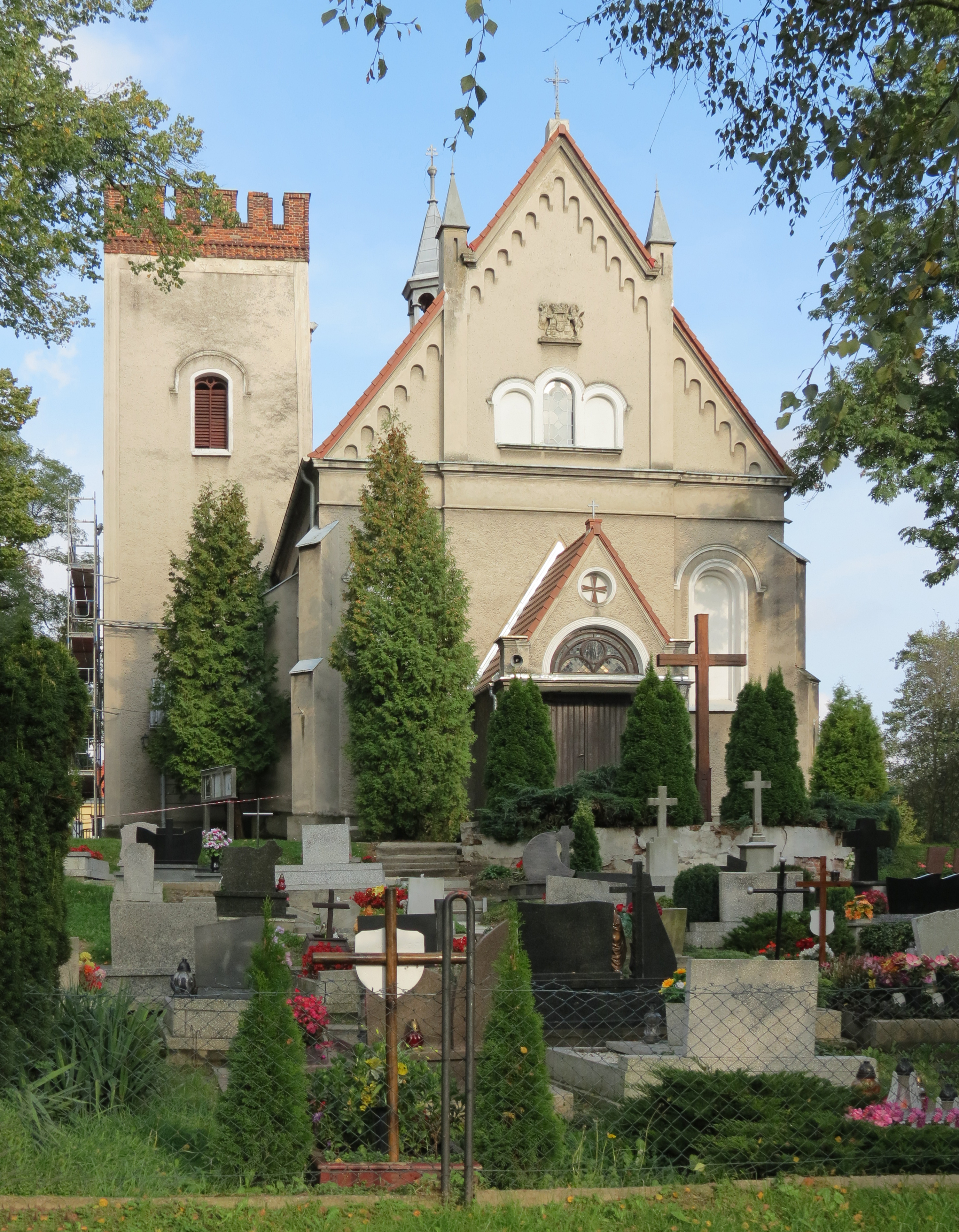 Kamieniec, kościół parafialny pw. Narodzenia św. Jana Chrzciciela, 1413, 1860-1870